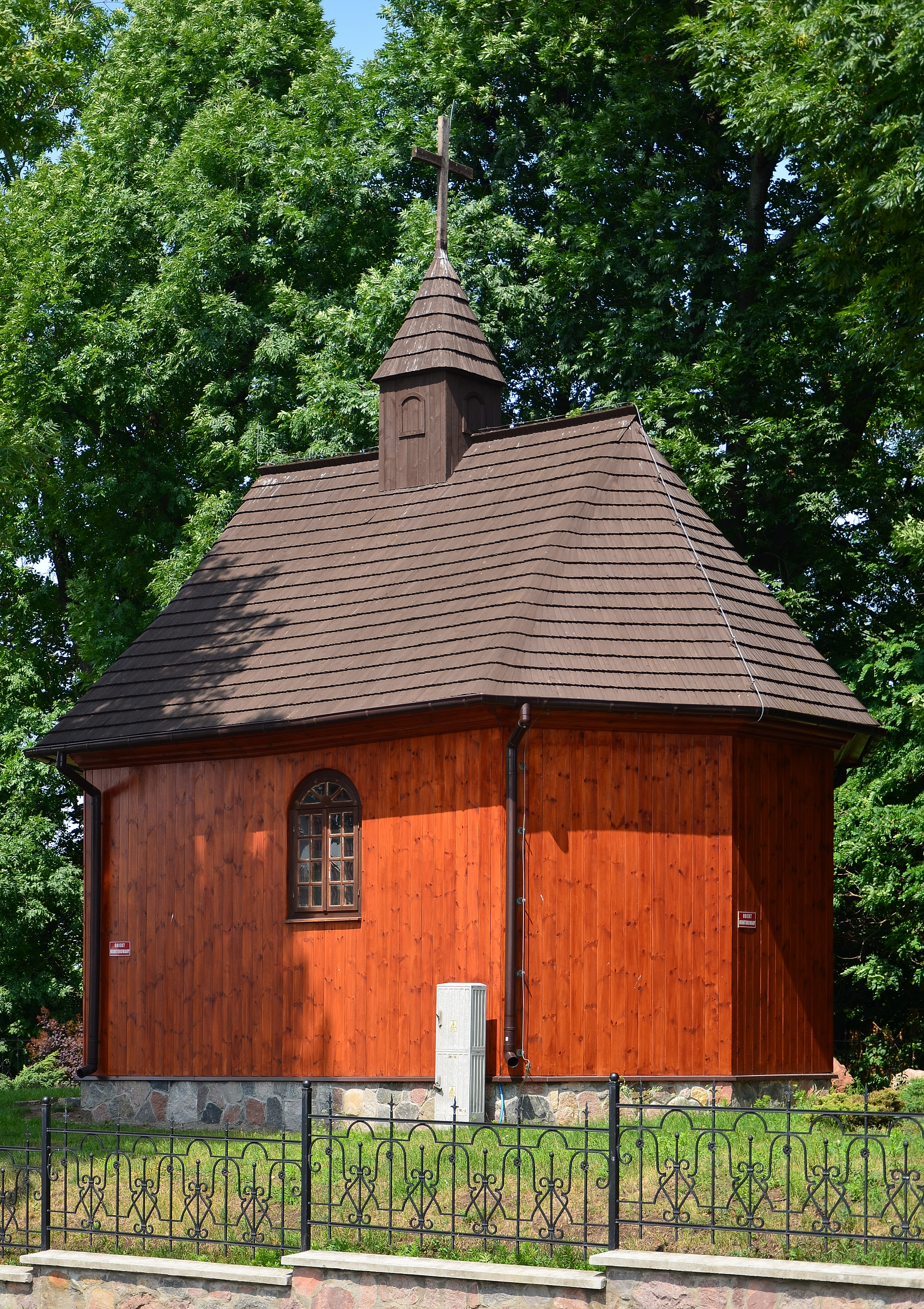 Kaplica św. Barbary, XVII w.